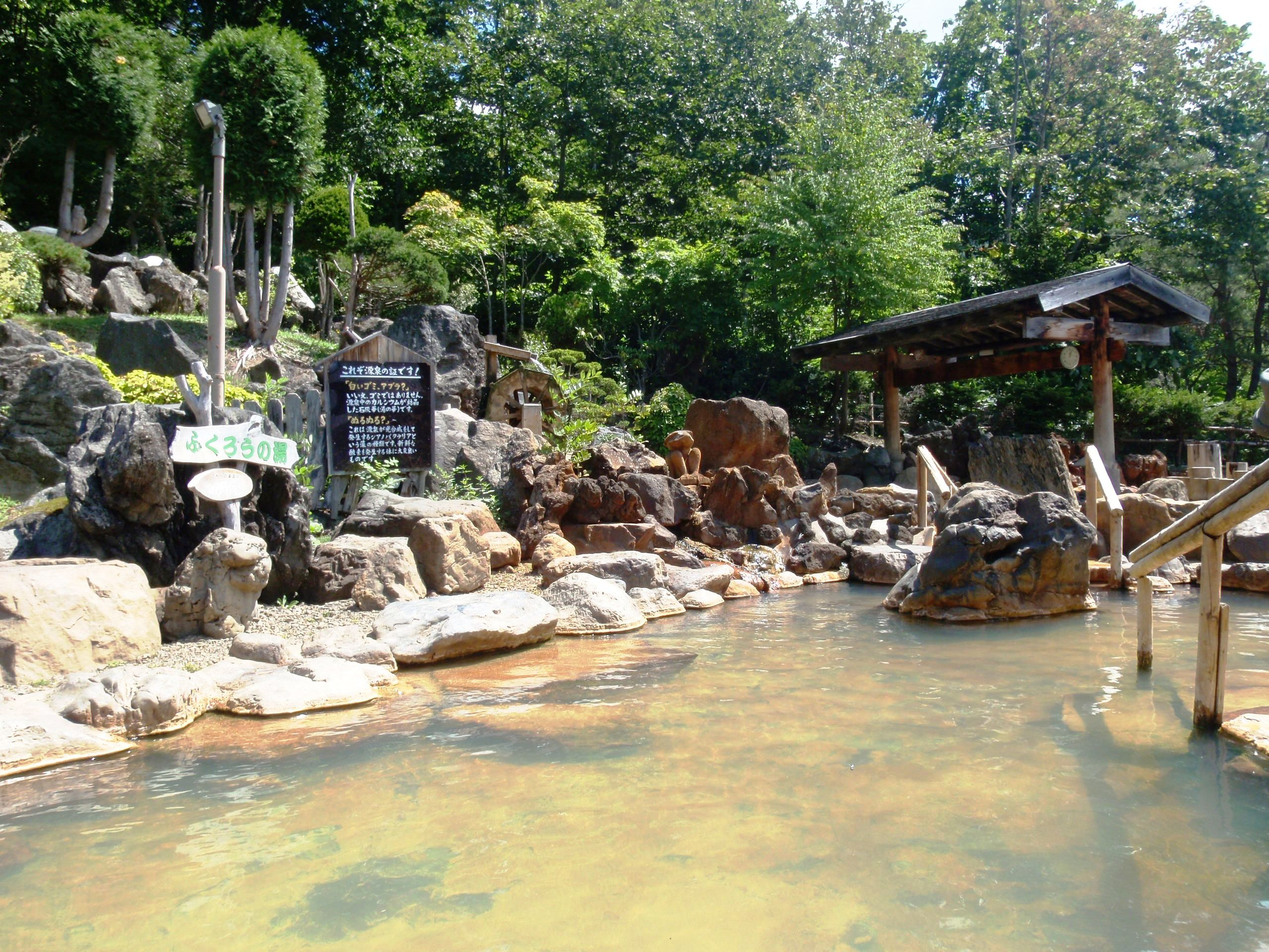 豊平峡温泉露天風呂